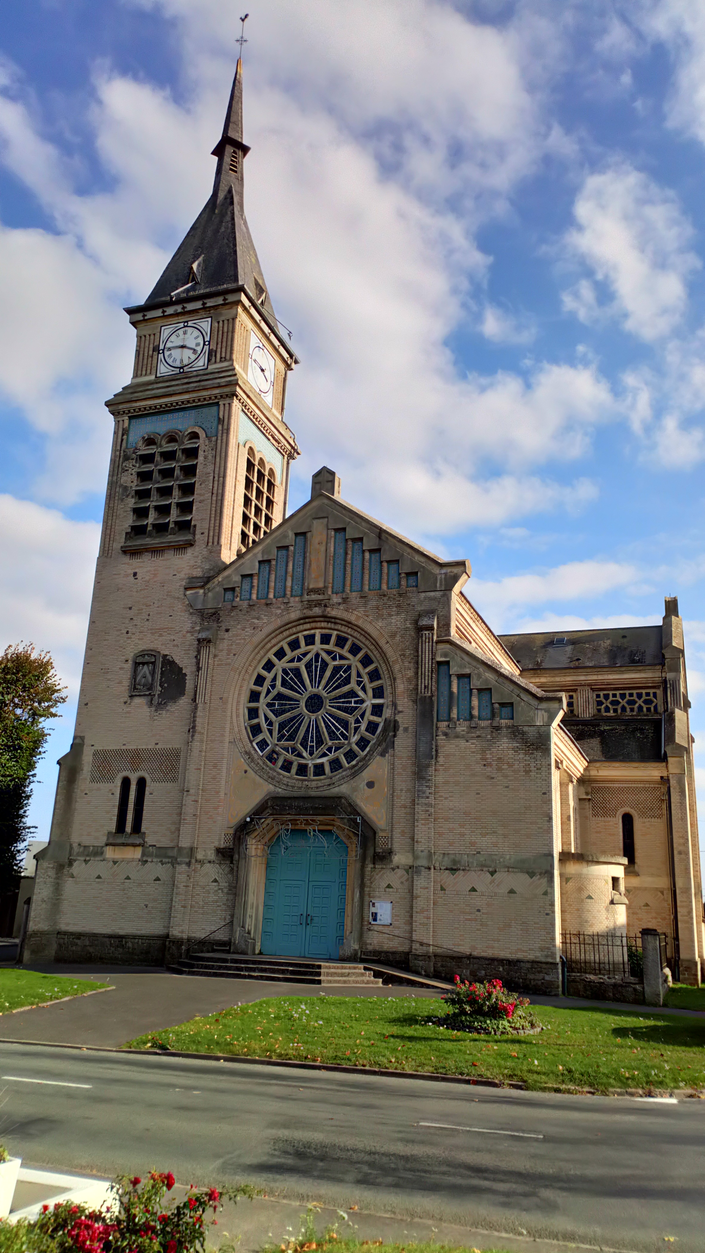 Eglise Saint-Didier de Chaulnes (14)